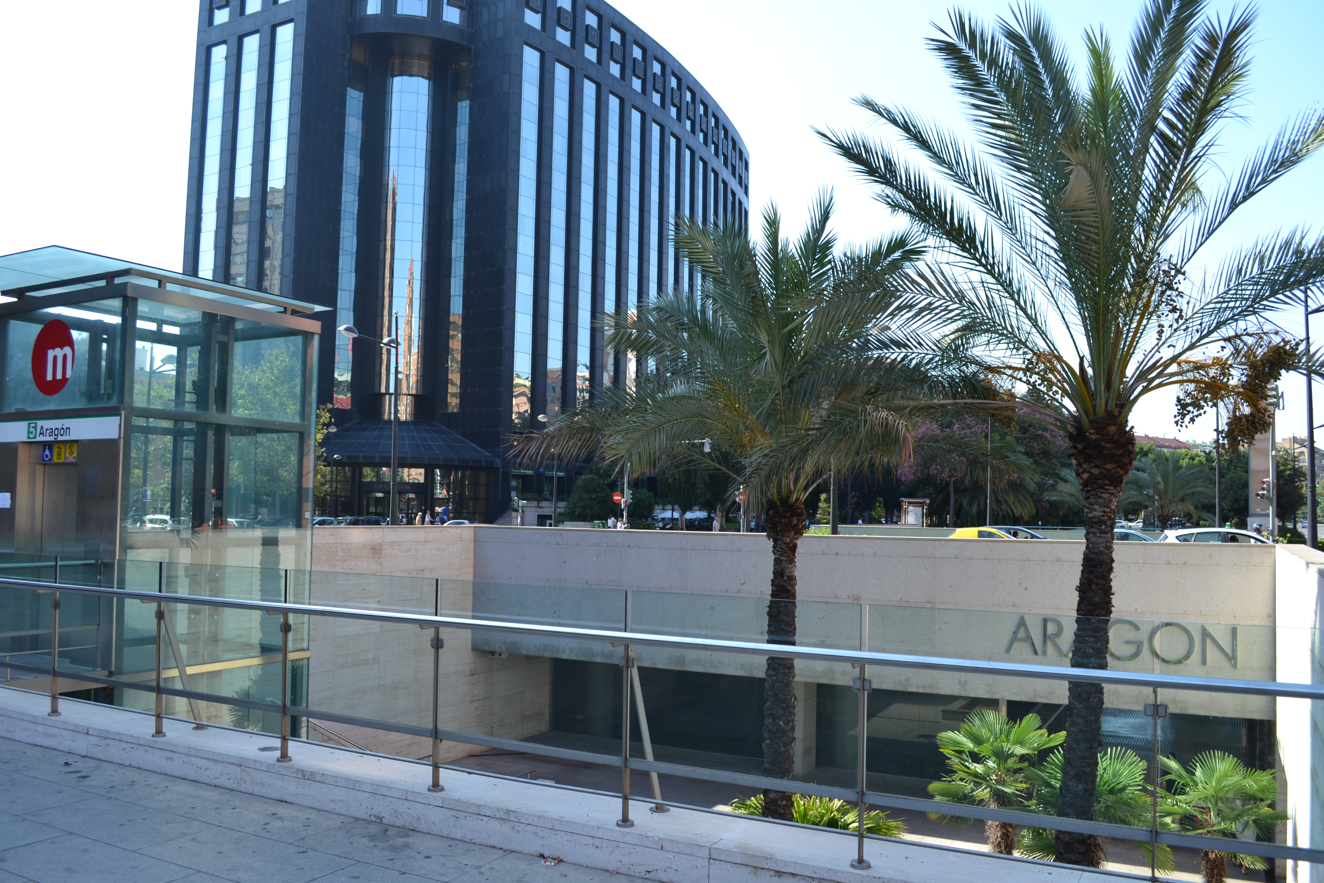 Entrada a l'estació d'Aragó, València